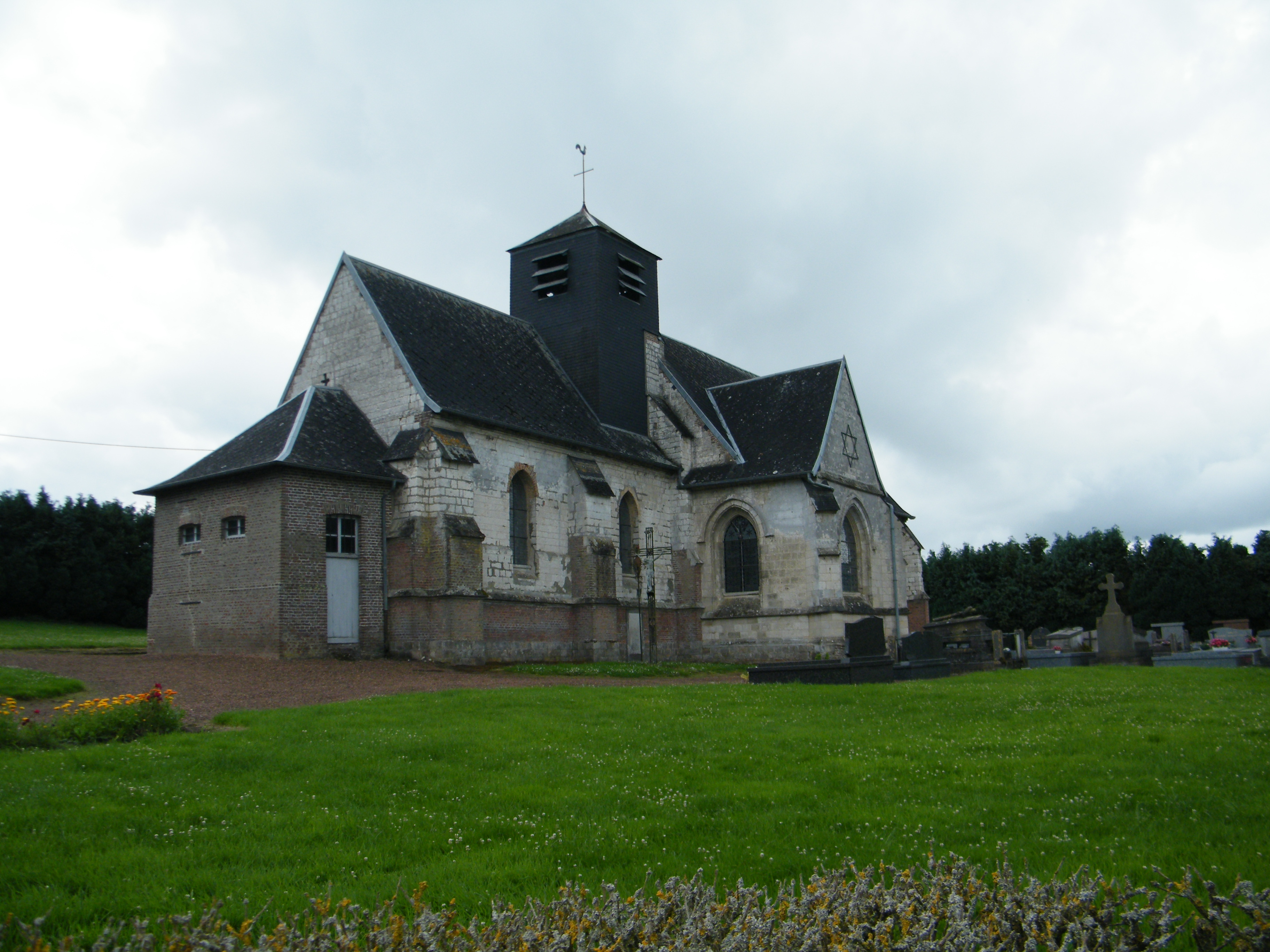 Au milieu d'un pré, Notre-Dame de Mons. .